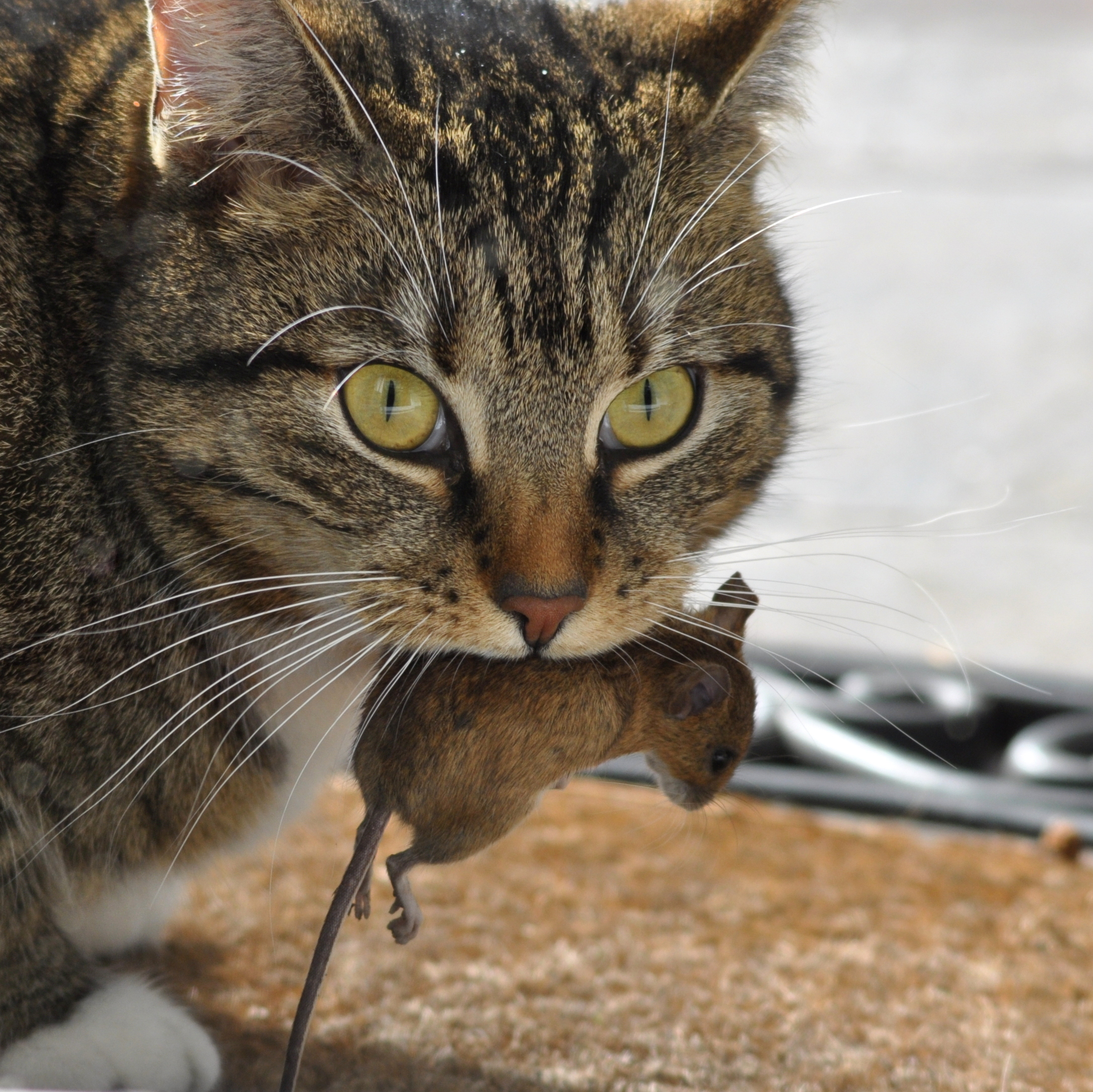 Kot domowy ze swoją zdobyczą